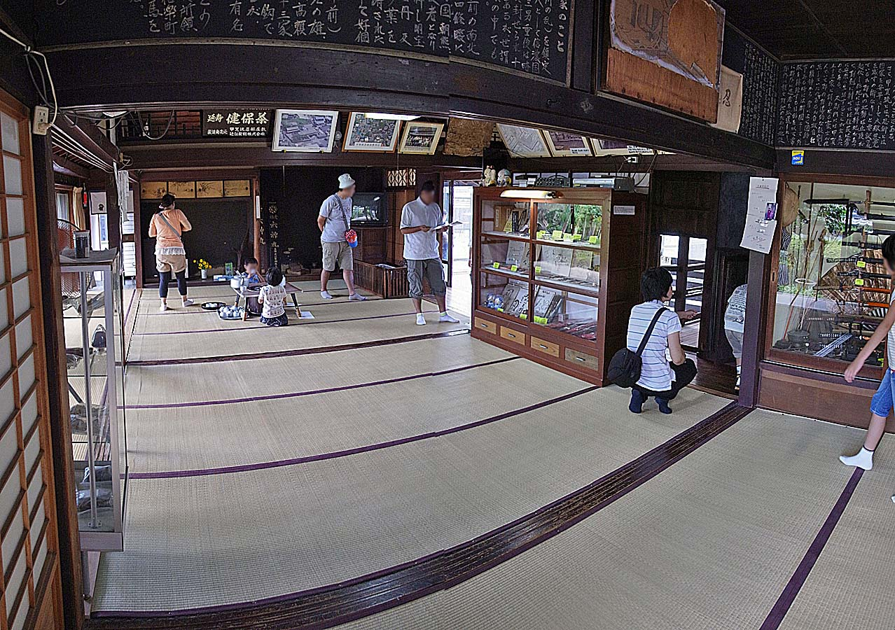 Koga-ryu Ninjya House , 甲賀流忍術屋敷